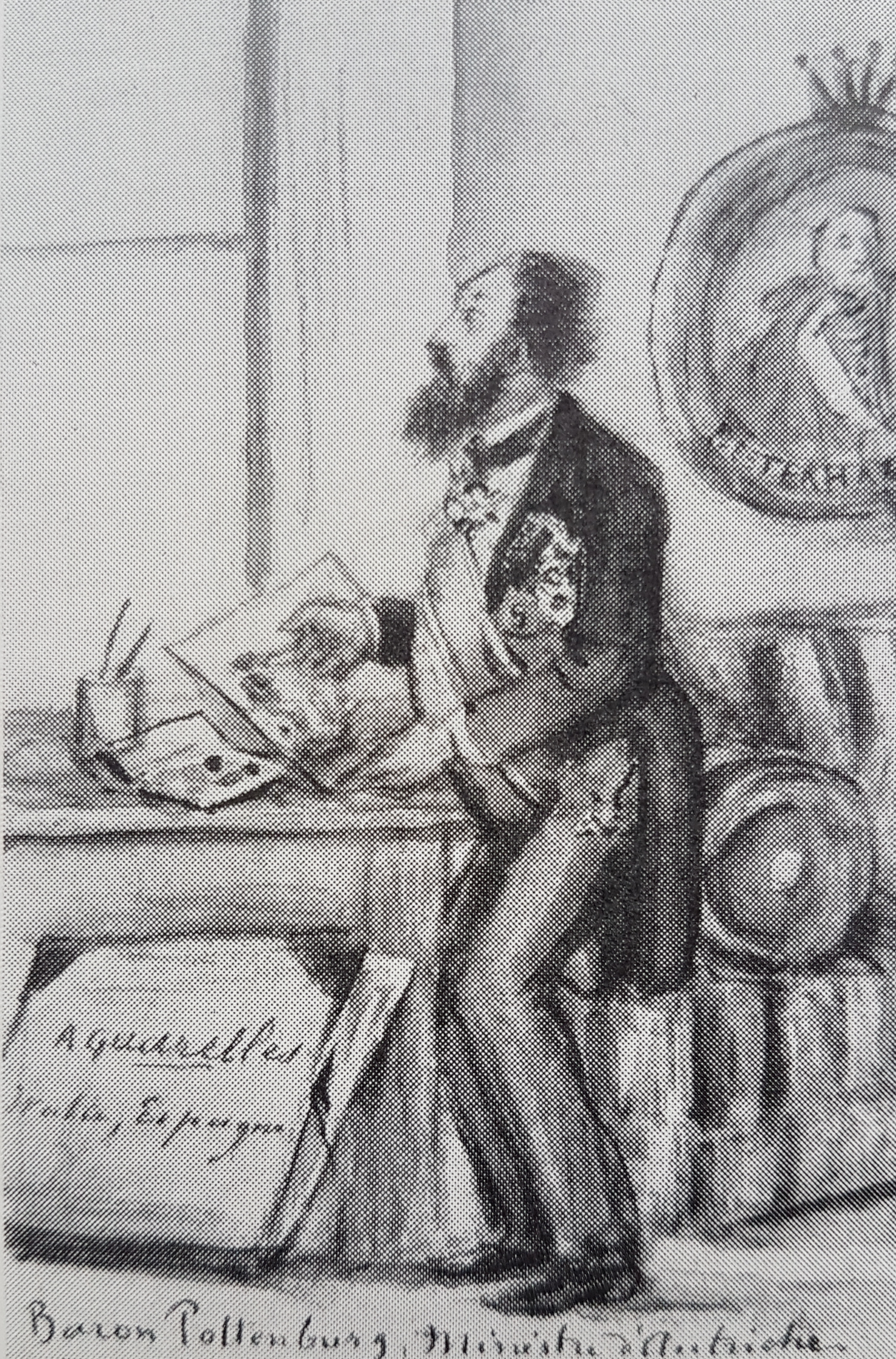 Nicolaus von Pottenburg avbildad av Fritz von Dardel, avfotograferad porträttbild från Allhems Svenskt konstnärslexikon.